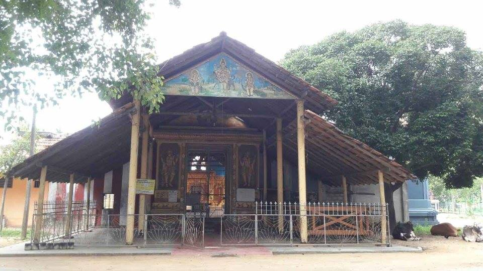 தலையாழி ஞான வைரவர் ஆலய முன்பக்க தோற்றம்